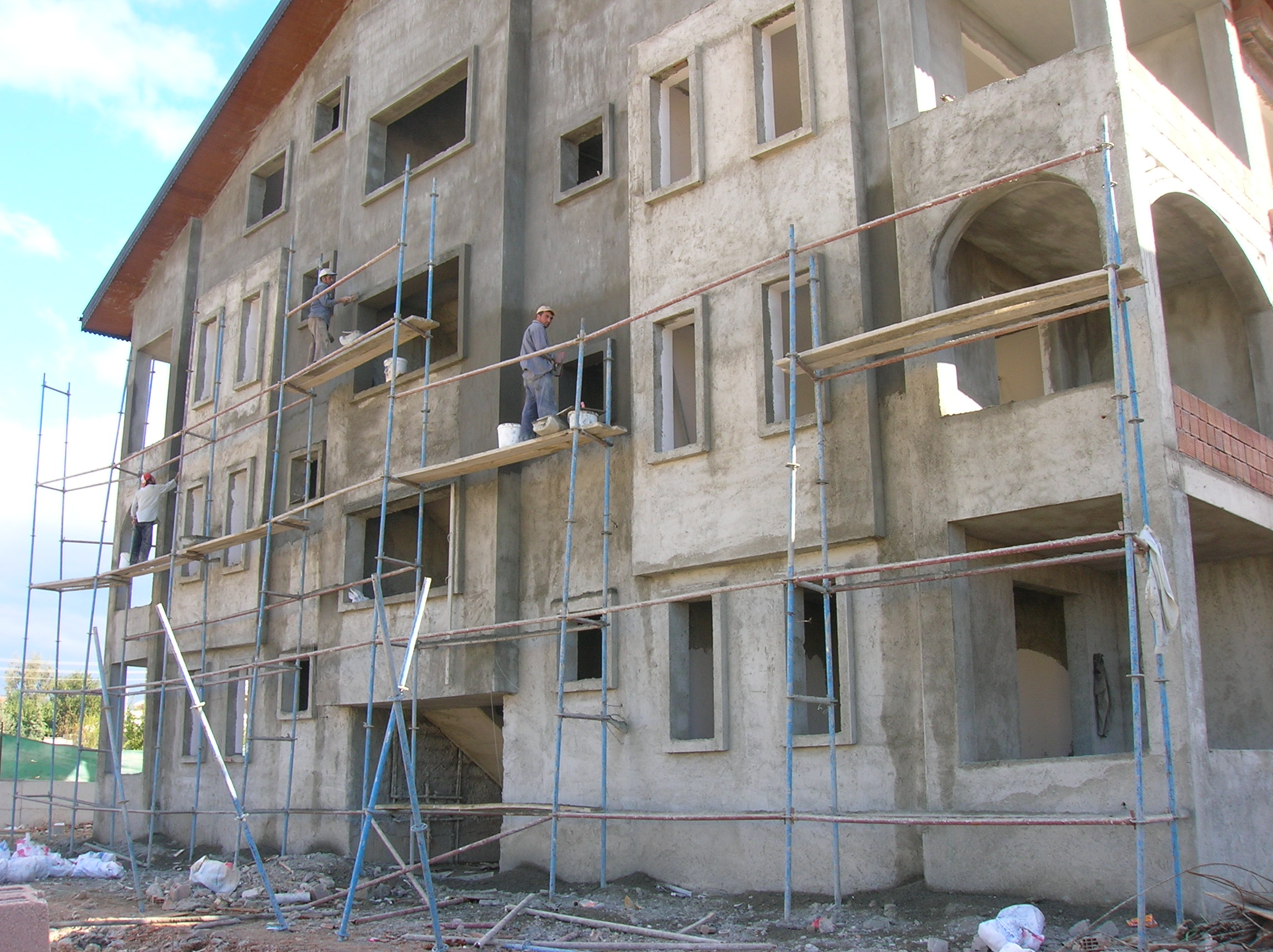 Zelfgemaakte foto, november 2006, (c) Erik1980: Een steiger op een bouwplaats in Side (Turkije). Dit ter illustratie van het grote verschil met NL steigerbouw.